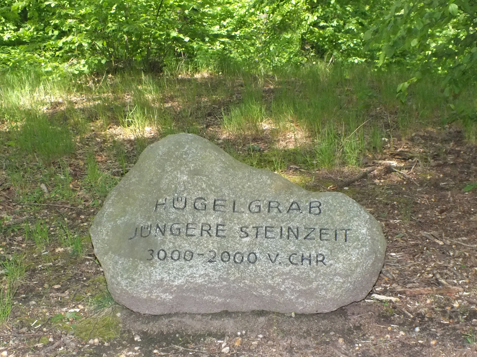 Die Markierung für ein Hügelgrab auf dem Bienitz (Leipzig).